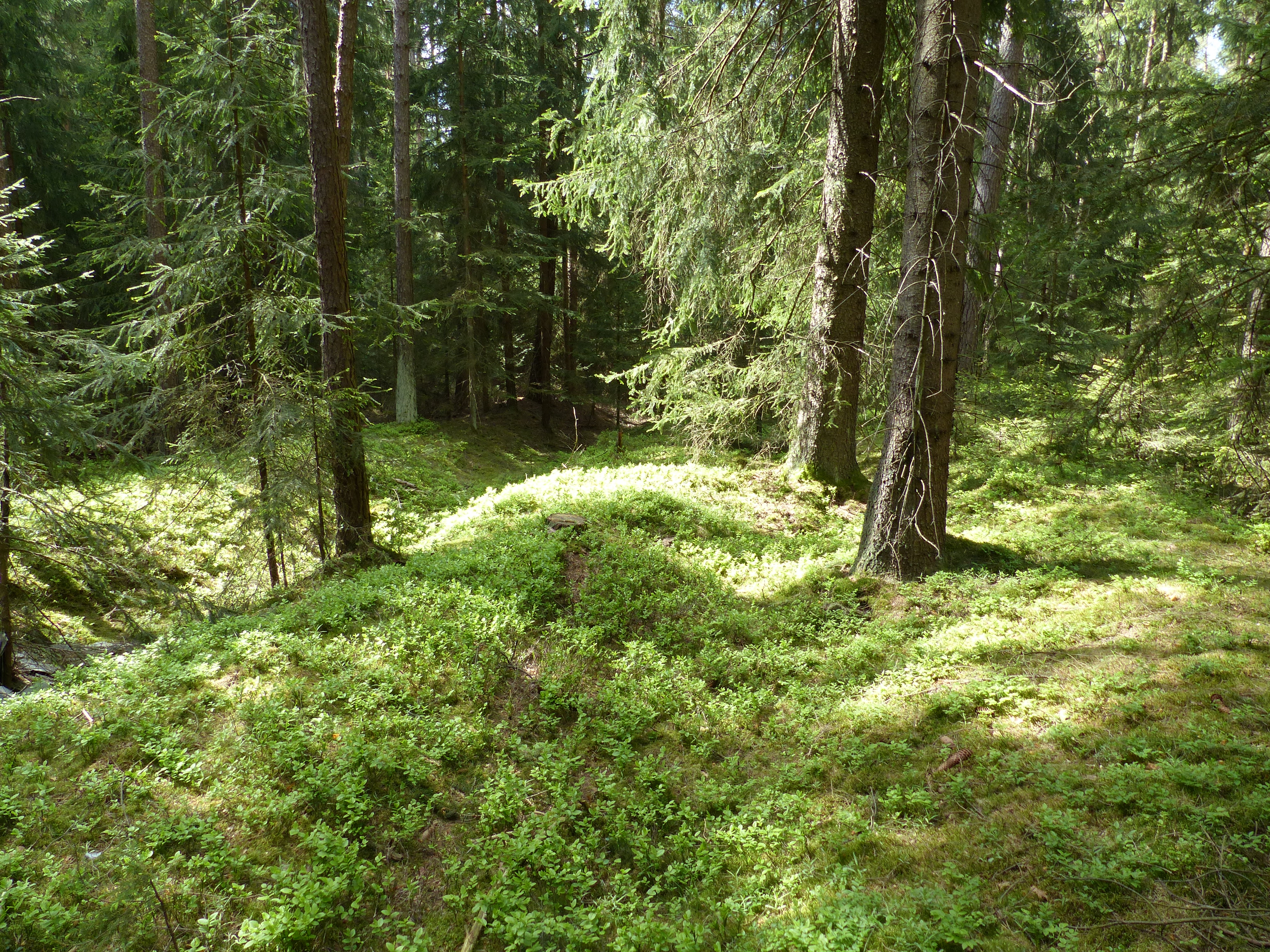 Zeitelmoos und Umgebung